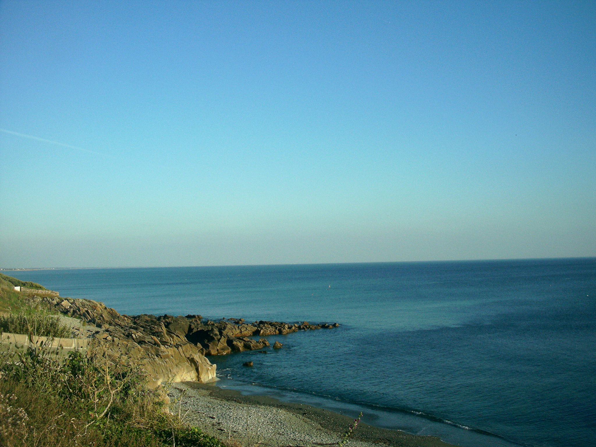 Plouhinec (Finistère) - Bucht von Pors Poulhan.